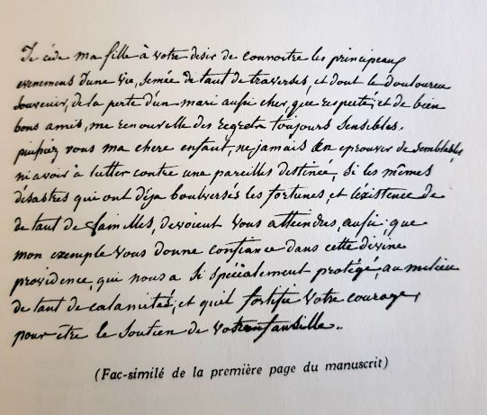 Fac similé mémoires de Rose Esther